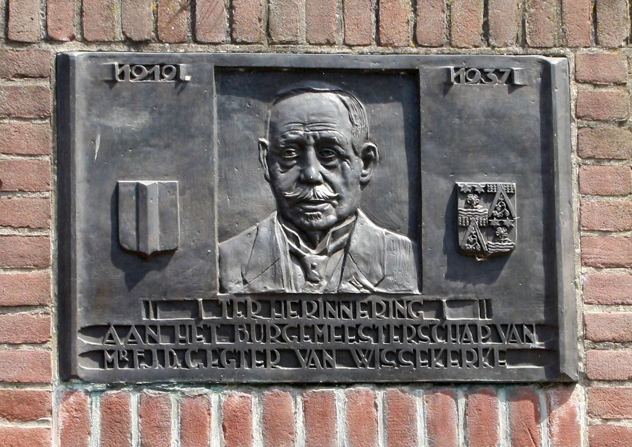 Plaquette ter herinnering aan burgemeester F.J.D.C. Egter van Wissekerke. (1919-1937) Kunstenaar:Martinus Leonardus Middelhoek. Locatie: Kaaistraat/Oostdam